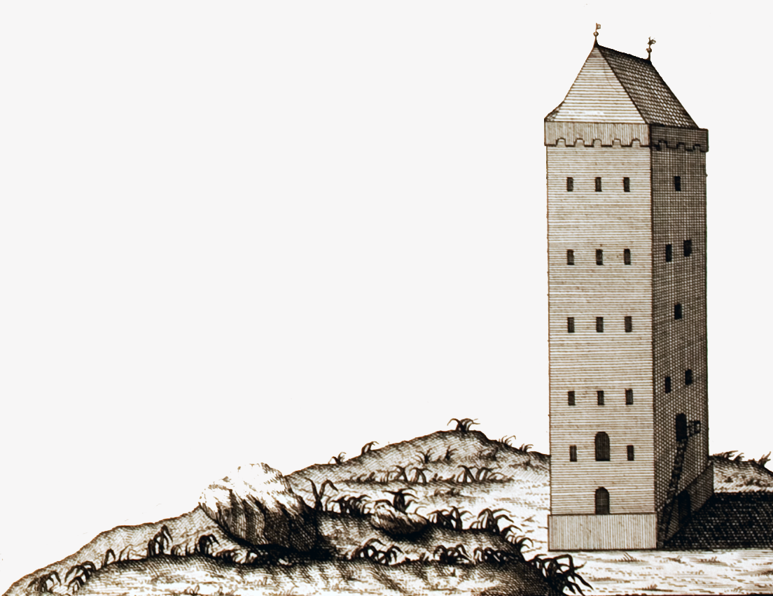 Turm Neuwerk (1751) vor dem Umbau zum Leuchtturm